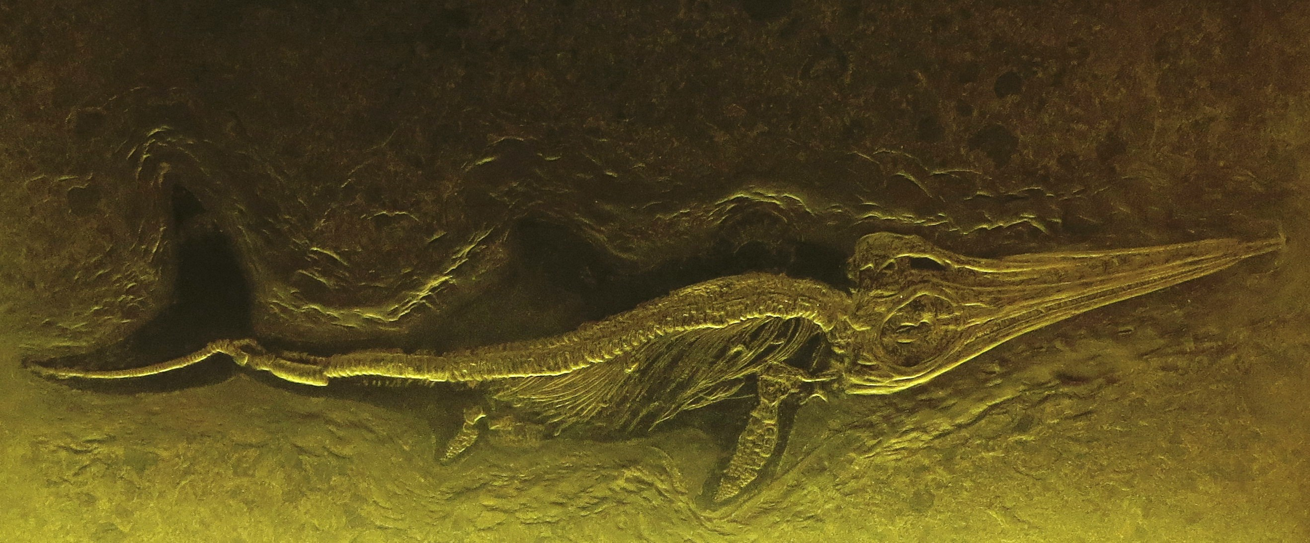 Fossil of Stenopterygius, an extinct reptile- Took the picture at Museo de la Naturaleza y el Hombre - Tenerife